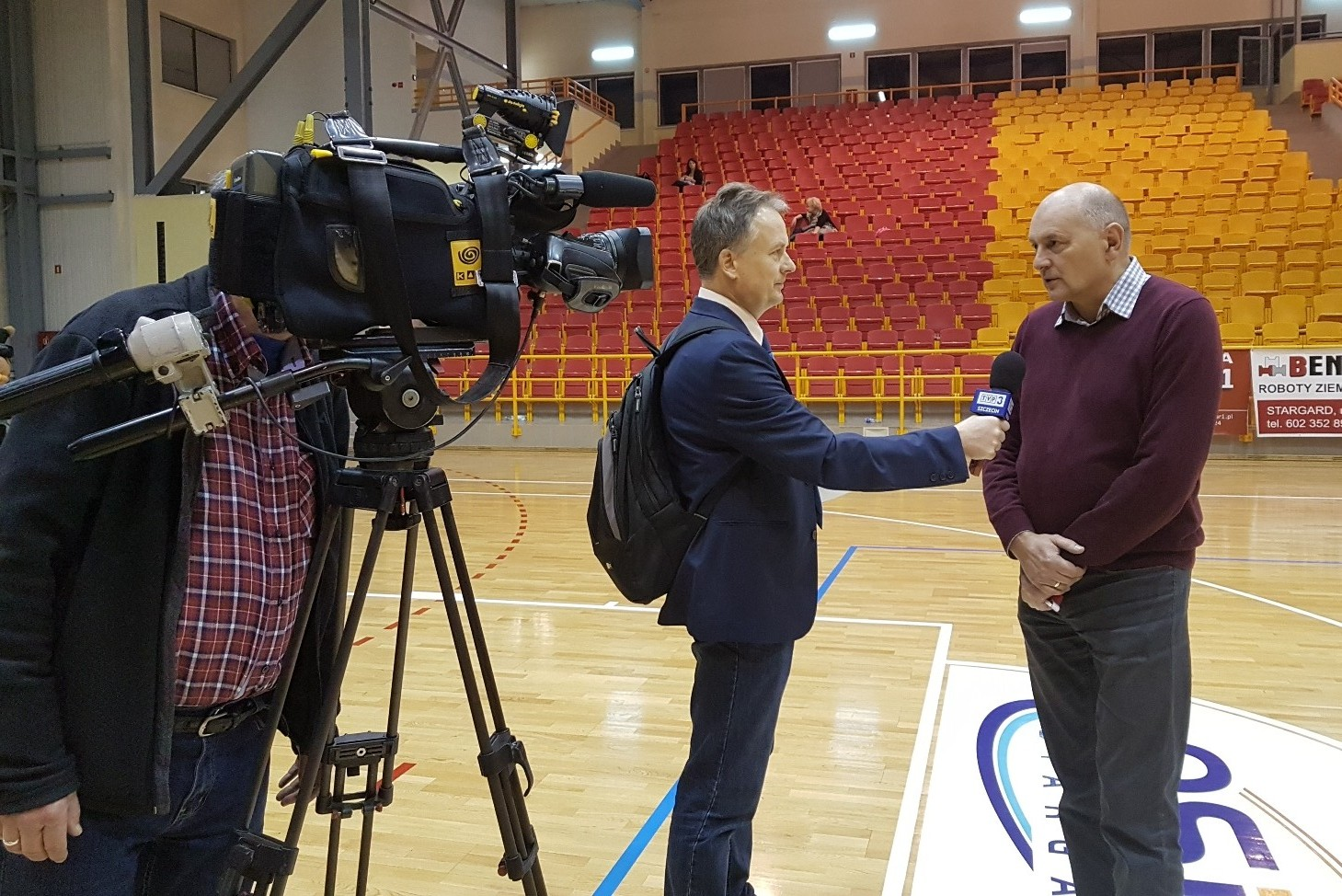 Stargard, 11.11.2017. Prezes Spójni Gutowski podczas wywiadu po meczu z Notecią